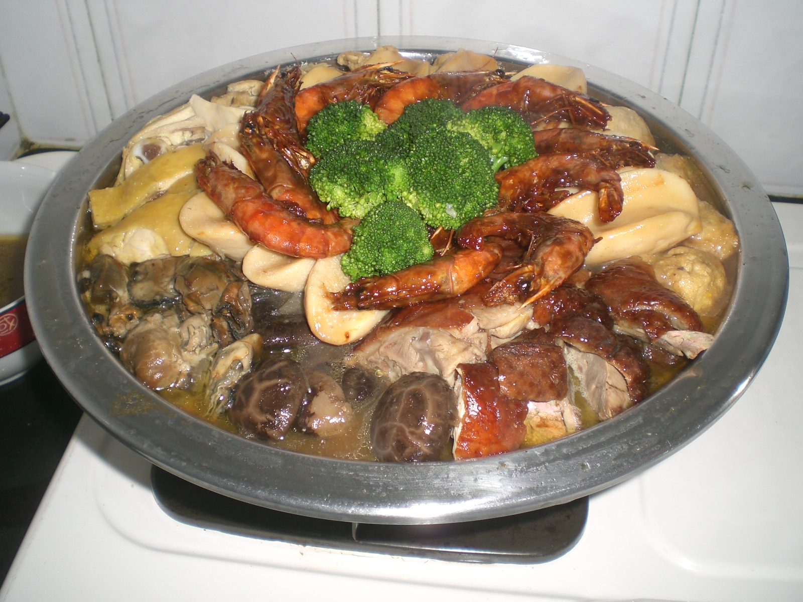 大家樂 盆菜